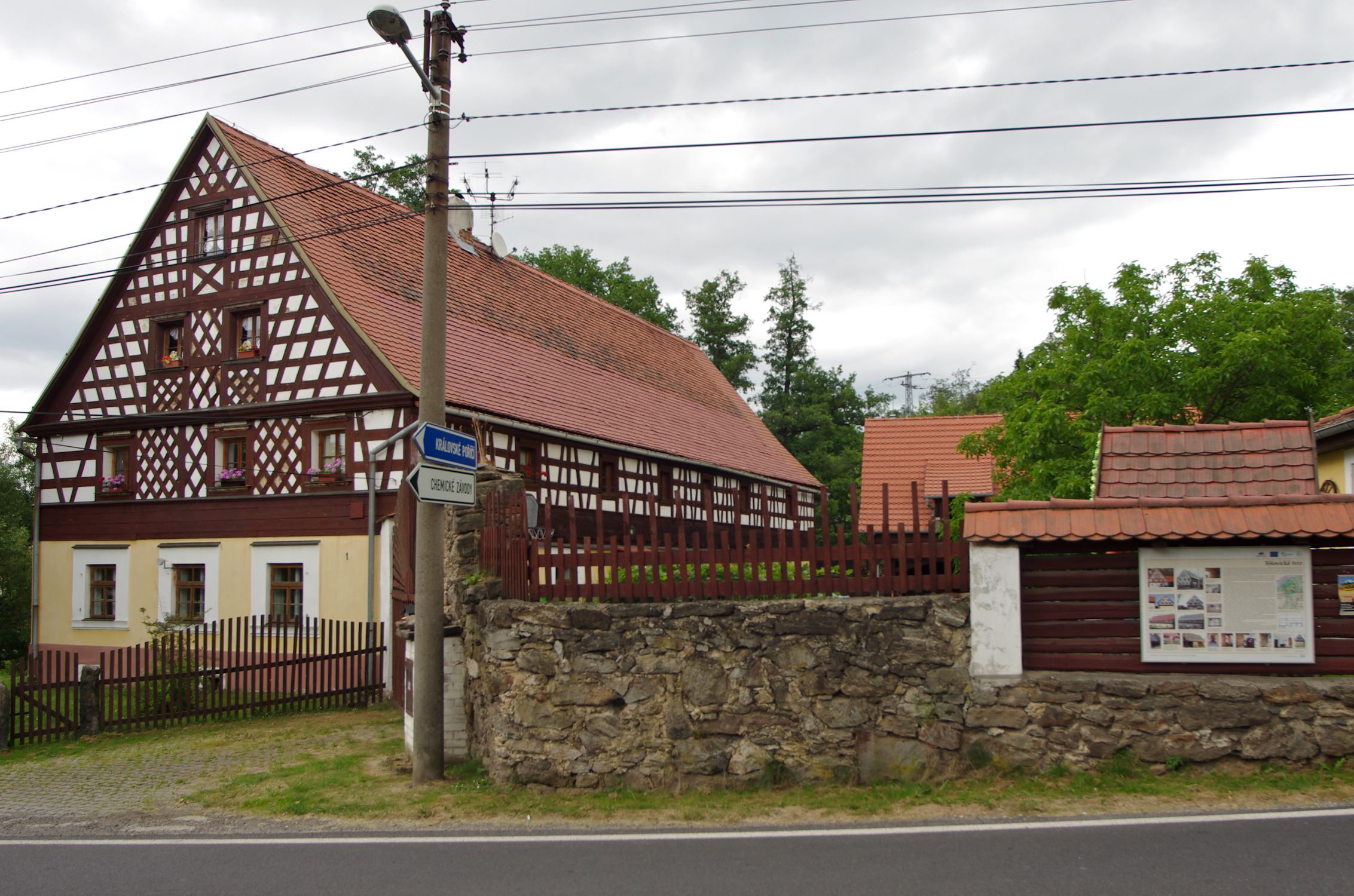 Tvrz, archeologické stopy, Těšovice 1